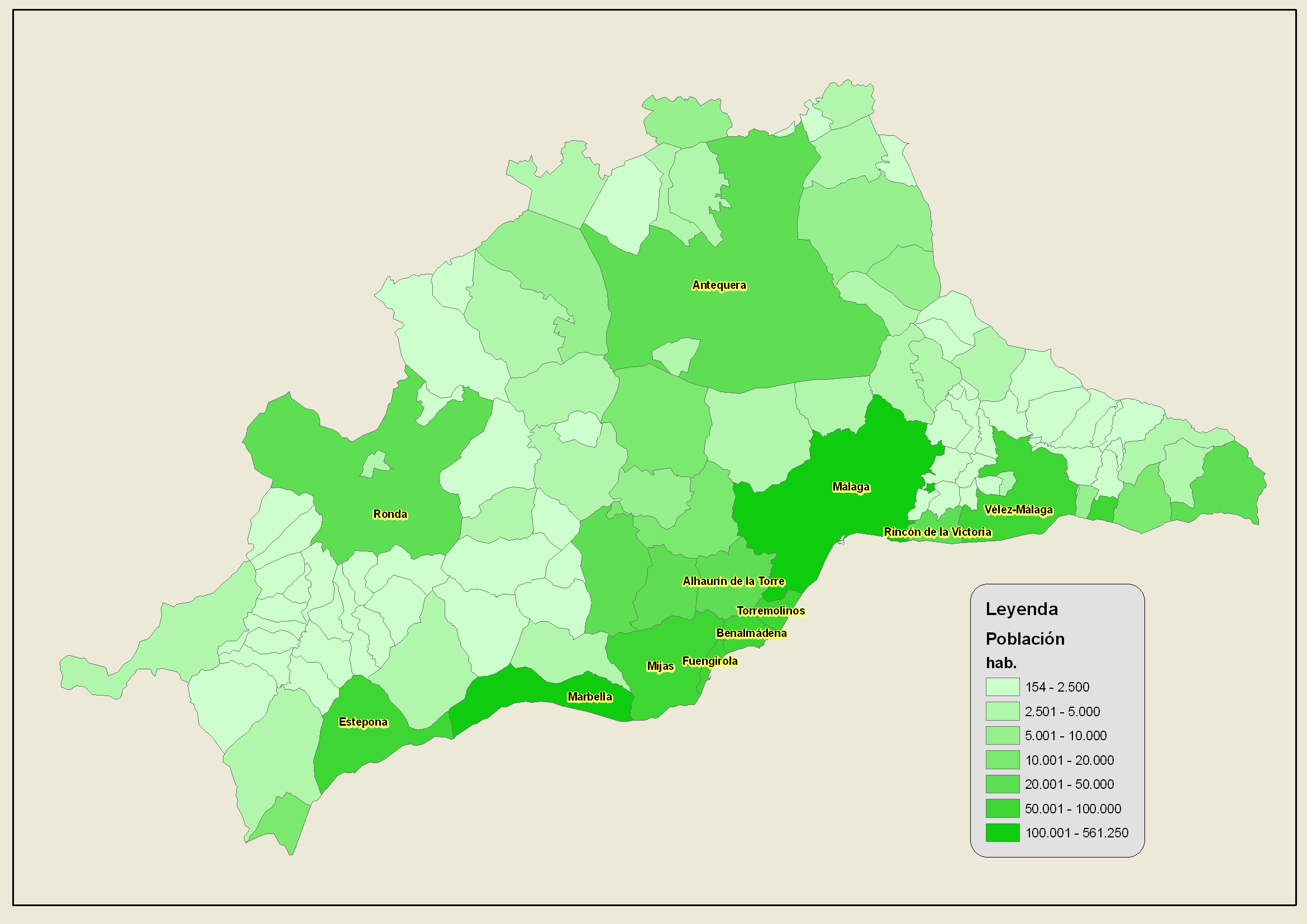 Mapa de población por municipios de la provincia de Málaga en 2007.